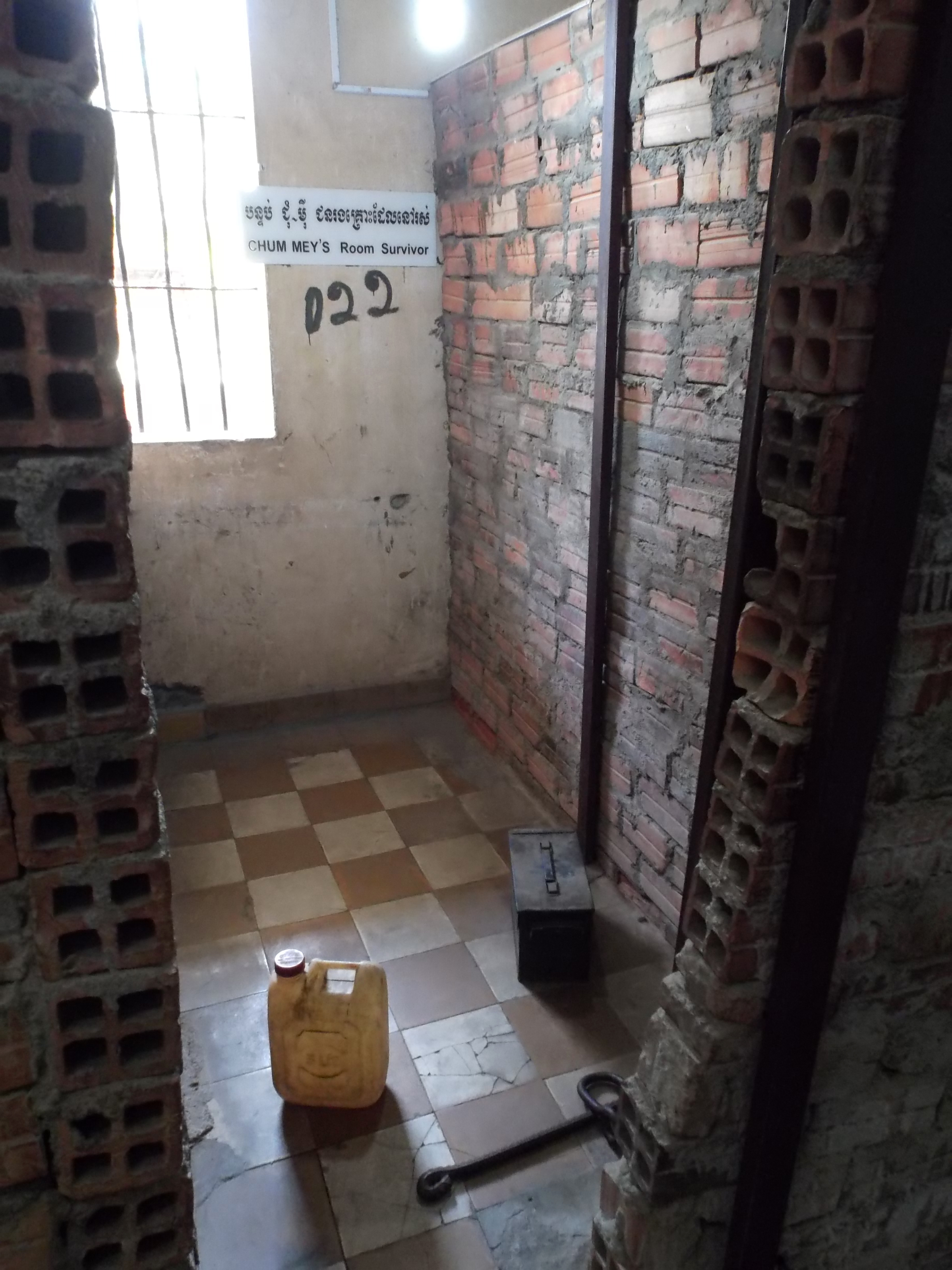 Одиночная камера, в которой был заключен Чум Мей. Корпус "С" допросного центра S-21 (Туол Сленг).